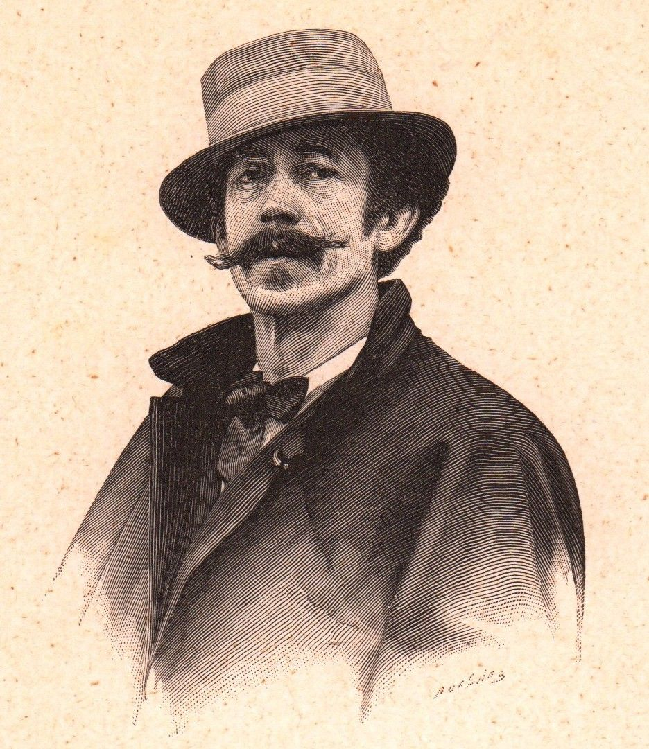 French painter Fernand Pelez (1848-1913)